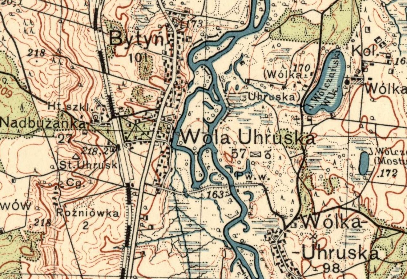 Wola Uhruska na mapie Wojskowego Instytutu Geograficznego z 1933 r.